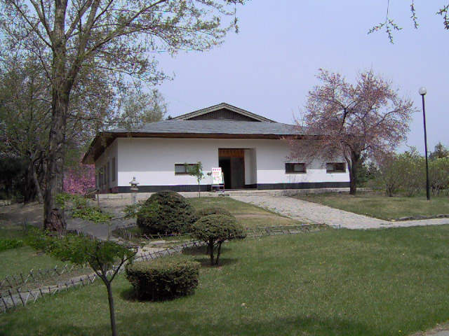 中文（中国大陆）: 哈尔滨太阳岛新潟友谊园